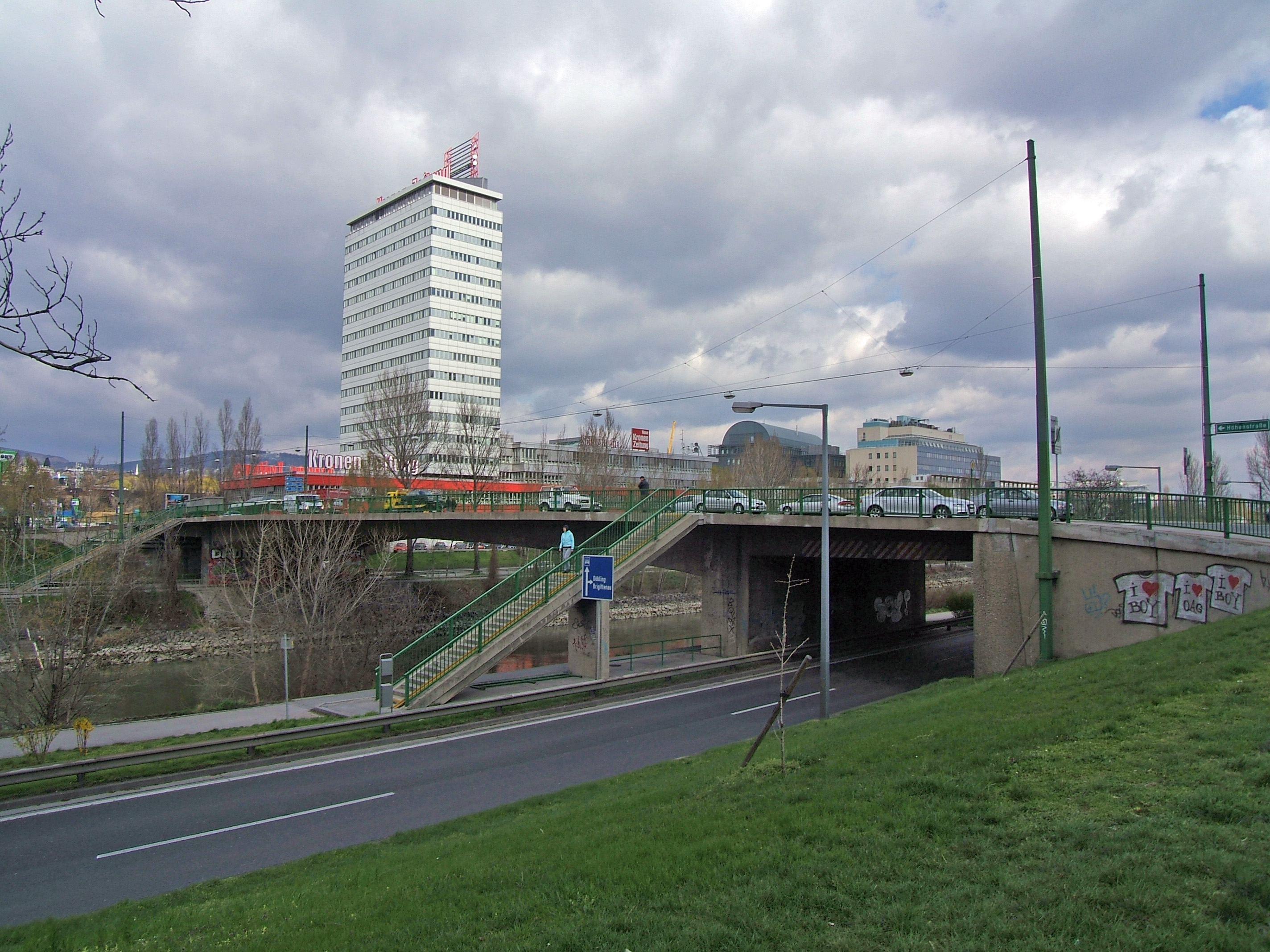 Heiligenstädterbrücke, Vienna 20th district